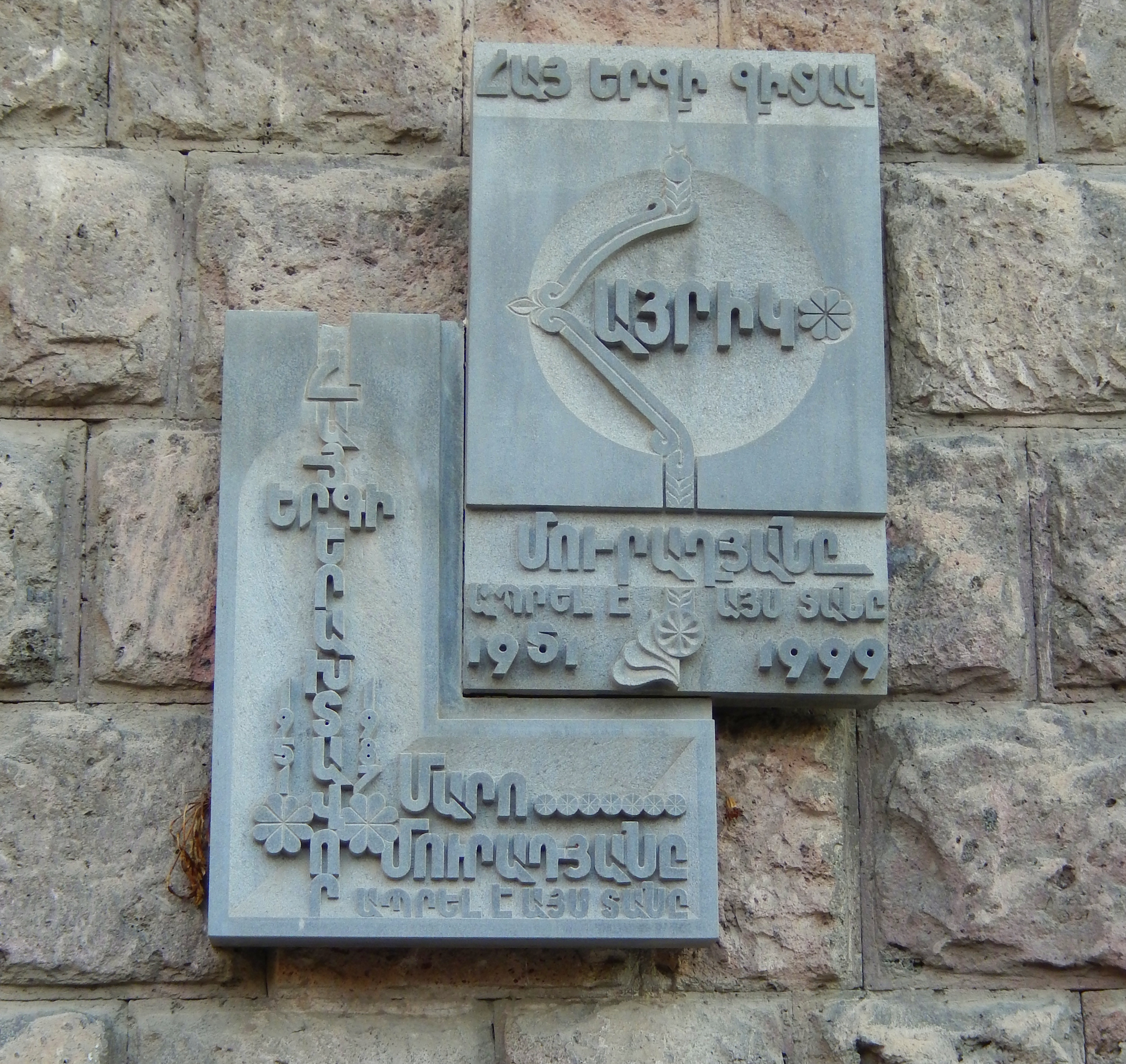 Քանդակագործ` Լյուդվիգ Խաչատրյան, ճարտարապետներ` Ֆելիքս Զարգարյան, Շահեն Մանուչարյան, Երվանդ Ավագյան